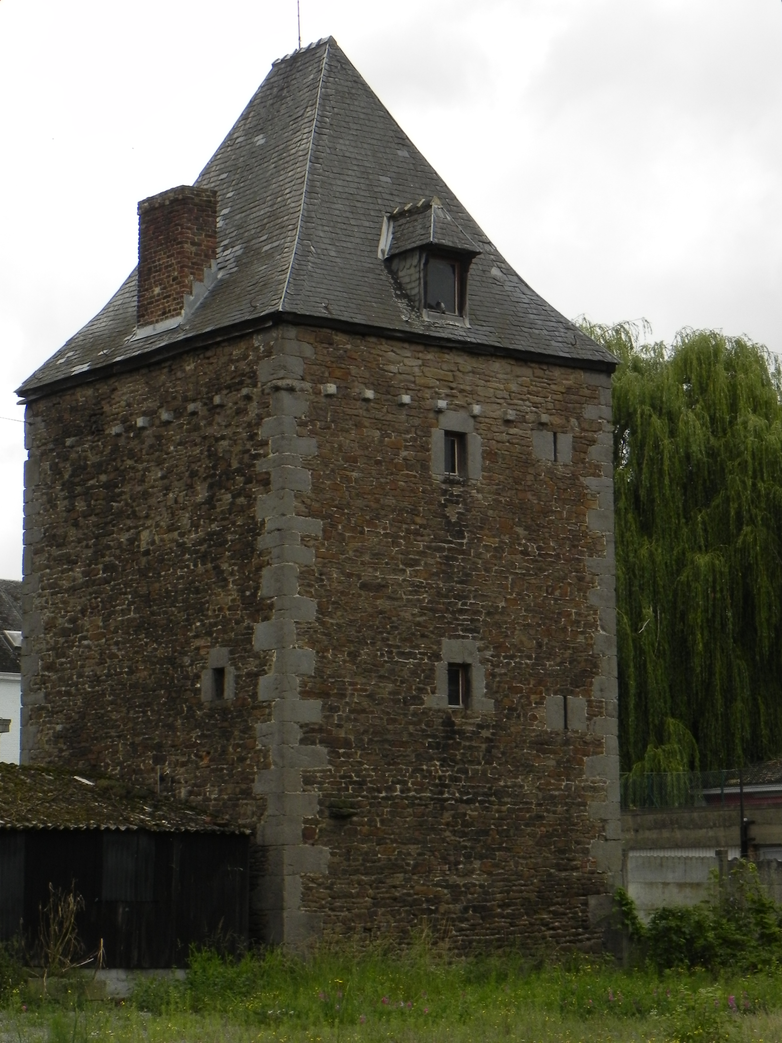 La Vieille tour, sise rue Saint Martin n°18 à Tamines. Accès par la rue Sous la Ville.